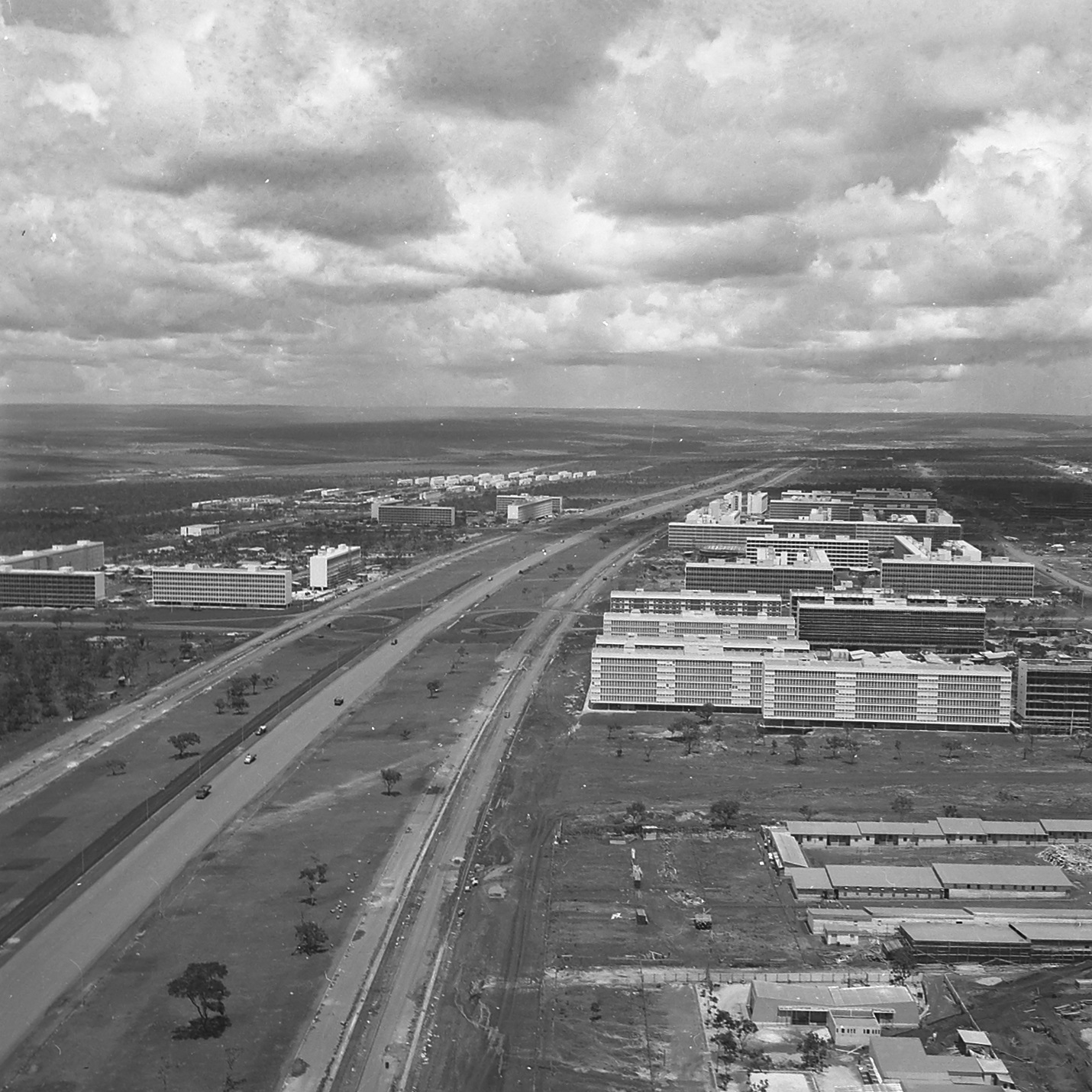 Imagem do Fundo Agência Nacional, do Arquivo Nacional